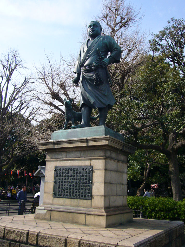 Statue of Saigo Takamori, Ueno Park, Tokyo, Japan